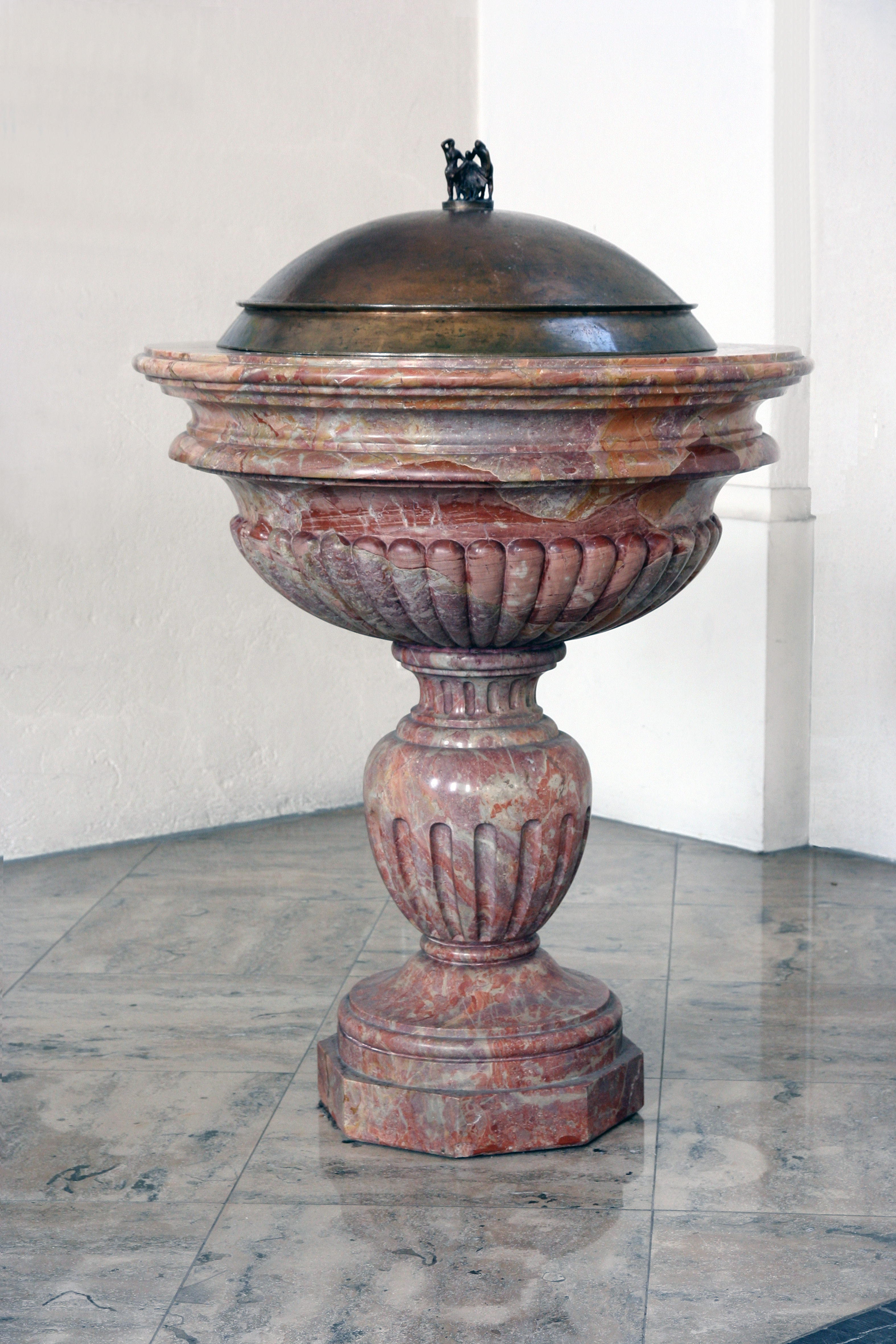 Römisch-katholische Pfarrkirche St. Felix und Regula Thalwil, Taufstein